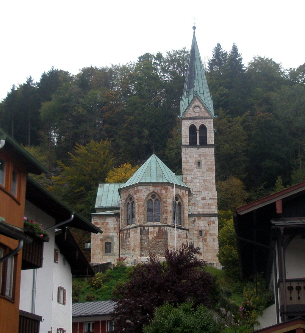 Christuskirche, 1899